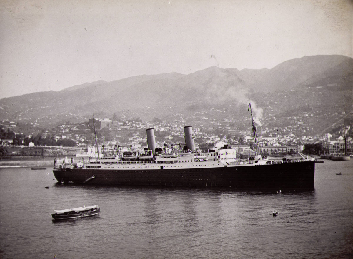 Photo of the cruise liner SS Montrose at Funchal, Madeira. This photo is part of a small series from an old b&w album, estimated to be taken in the early 1930s. Photo taken from the RMS Strathnaver.